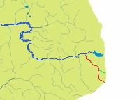 Górna Narew (niebieska) z dopływami z zaznaczoną Narewką (na czerwono) i Hwoźną (na zielono)